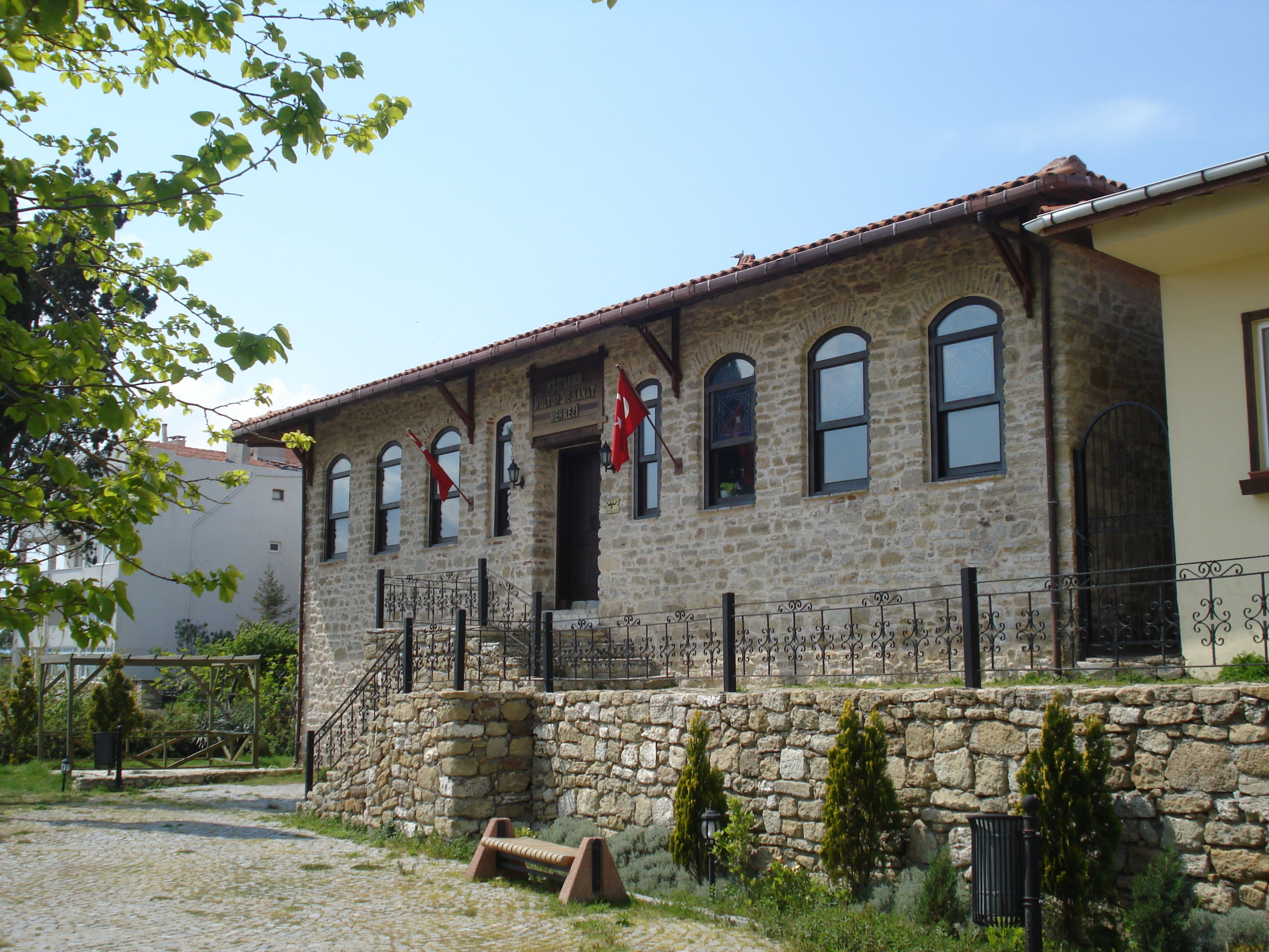 Restore edildikten sonra Kilitbahir Kültür ve Sanat Merkezi binasının ön cephesi